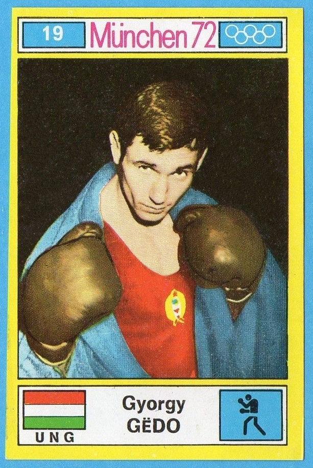 MUNCHEN/MONACO '72-PANINI-Figurina n.19- GEDO - UNGHERIA - PUGILATO